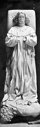 Liegefigur des Charles I. de Bourbon auf seiner Tumba in der Abteikirche von Souvigny, Skulptur gefertigt vom Bildhauer Jacques Morel